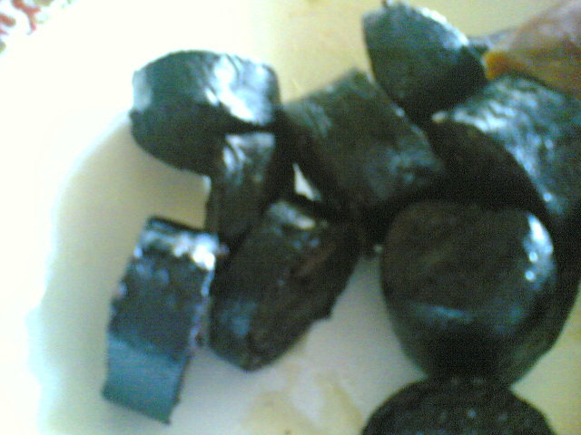 Cacholeira, a portuguese sausage